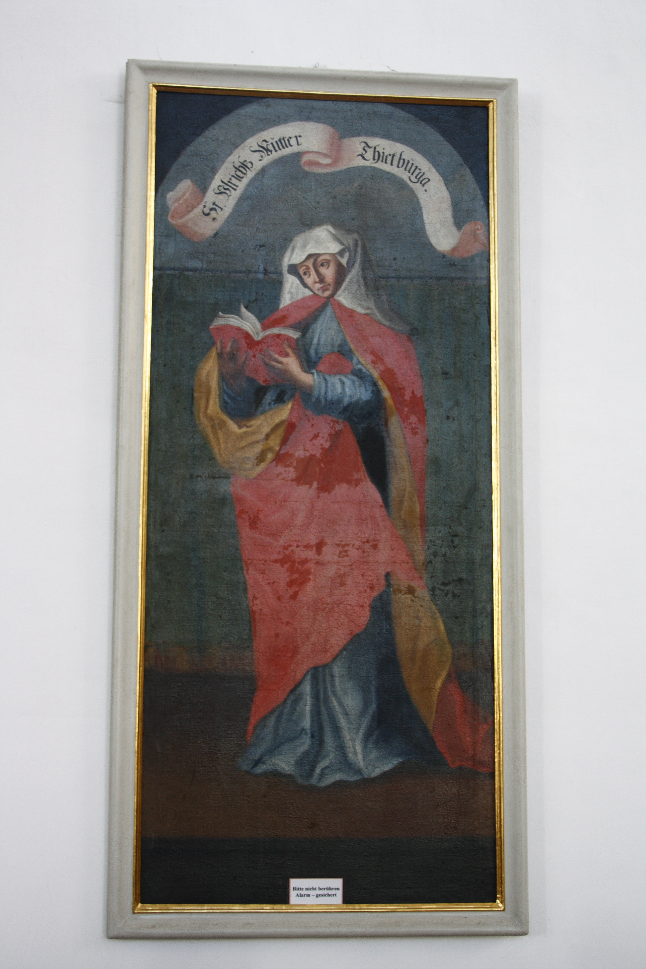 Katholische Pfarrkirche St. Ulrich und Martin in Wittislingen im Landkreis Dillingen an der Donau, Gemälde aus der 2. Hälfte des 18. Jahrhunderts (im Stil des 15. Jahrhunderts gemalt), Darstellung: Gräfin Thietburga, Mutter des hl. Ulrich